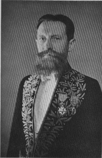 Portait de Marcel Aubert en tenue d'académicien